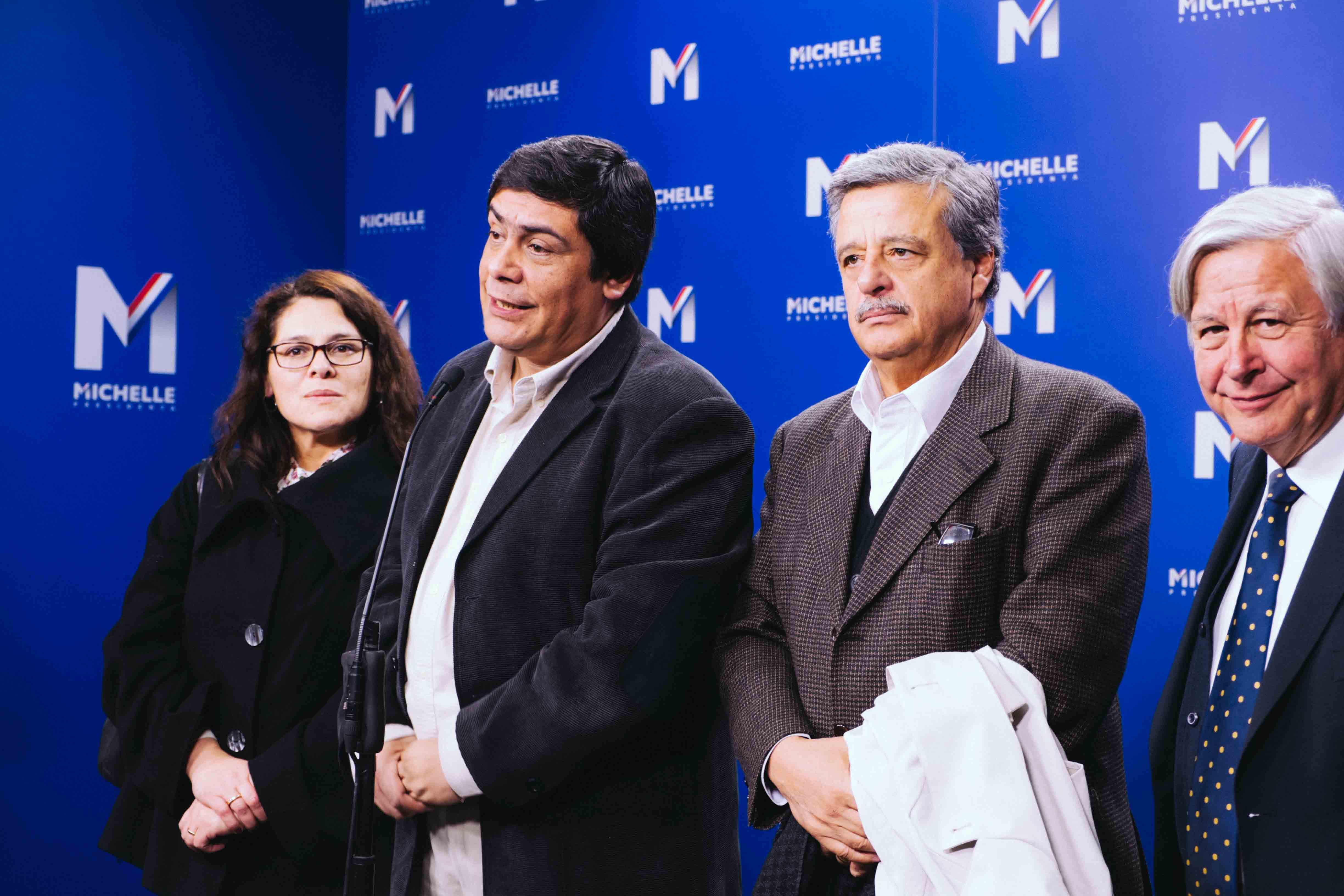 La directiva de la Izquierda Ciudadana oficializa su apoyo a la precandidata presidencial Michelle Bachelet.